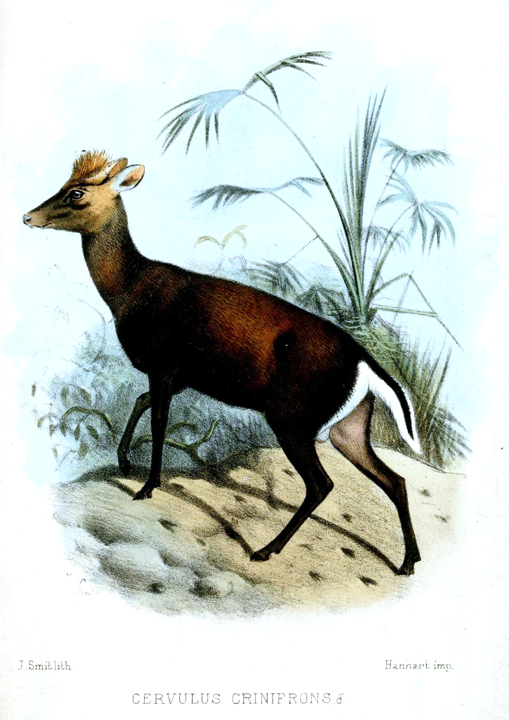 Cervulus crinifrons = Muntiacus crinifrons